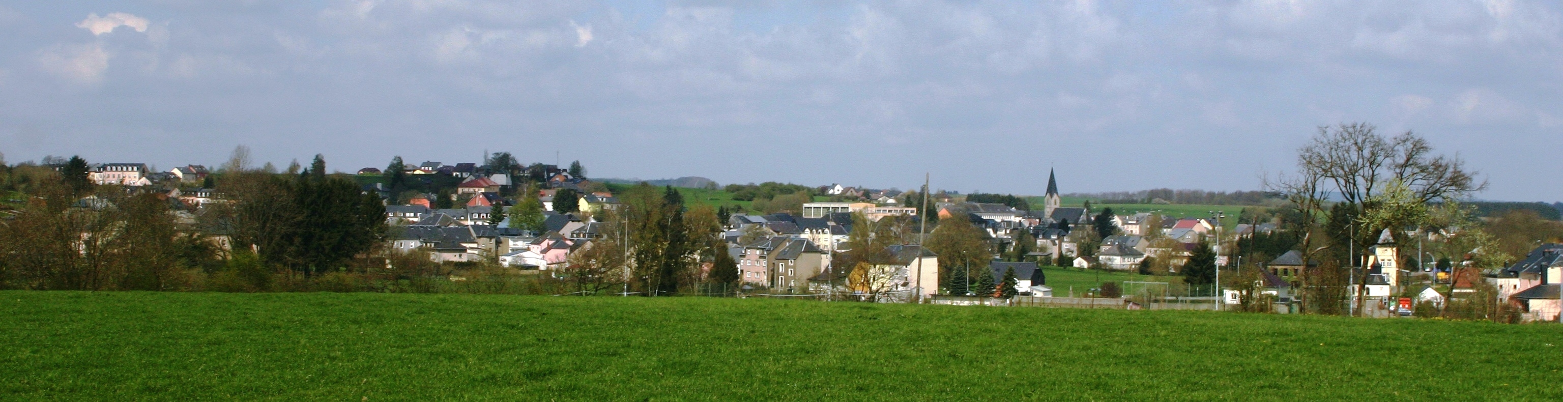 Kënzeg vum Méchelsbierg aus gesinn.